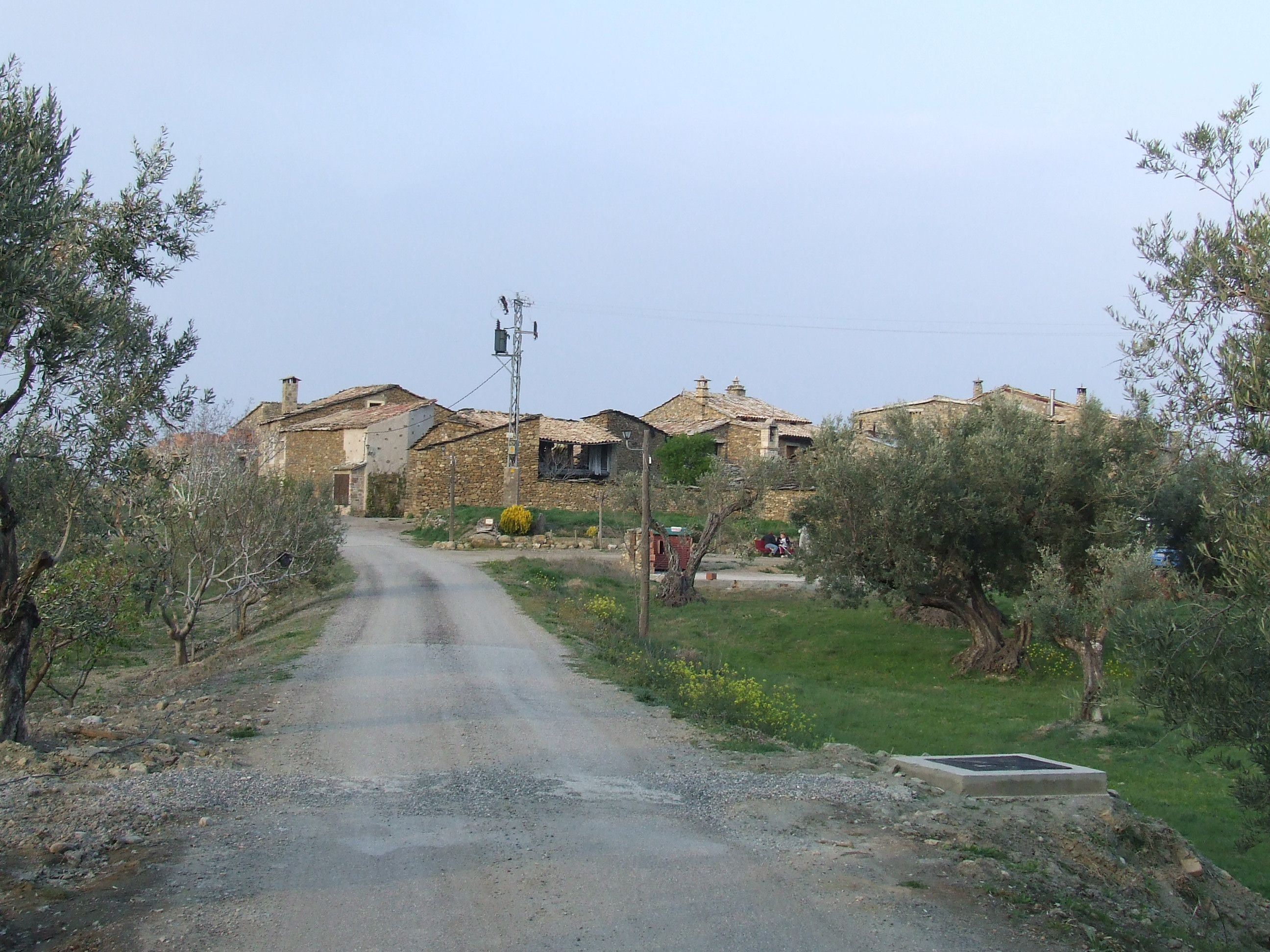 El poble de Vilamolat de Mur (Mur, Castell de Mur, Pallars Sobirà)